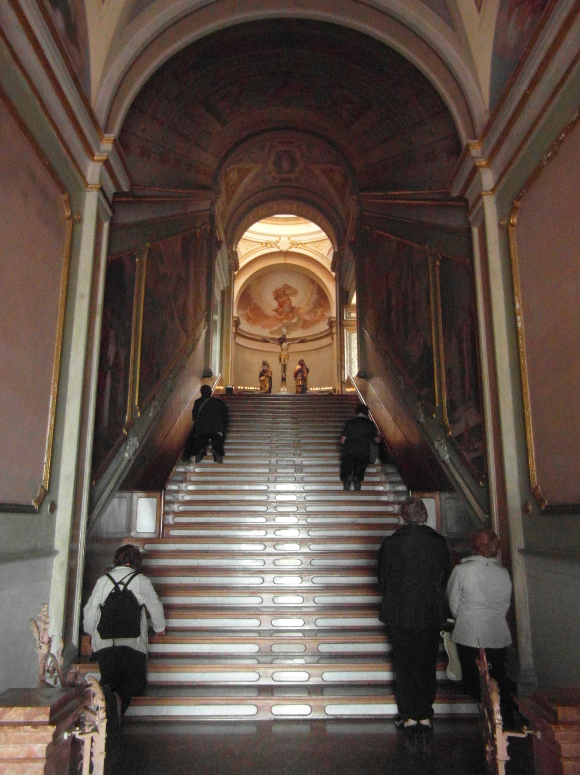 Scala Santa - Santuario delle Comparse